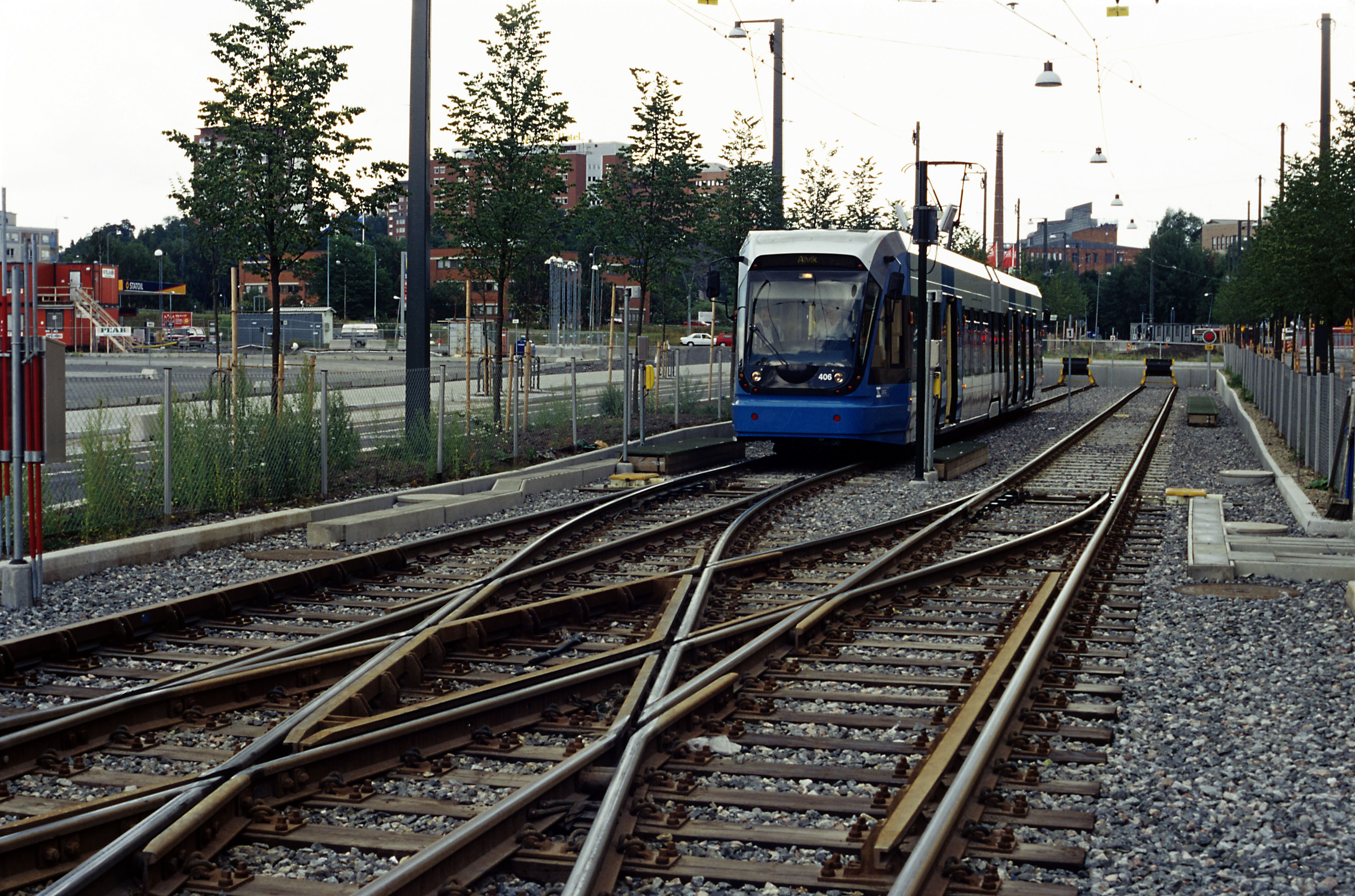 Zweigleisige Kehranlage, die doppelte Gleisverbindung erinnert an U-Bahn-Systeme. Die Strecke ist seit 2017 an dieser Stelle verlängert.